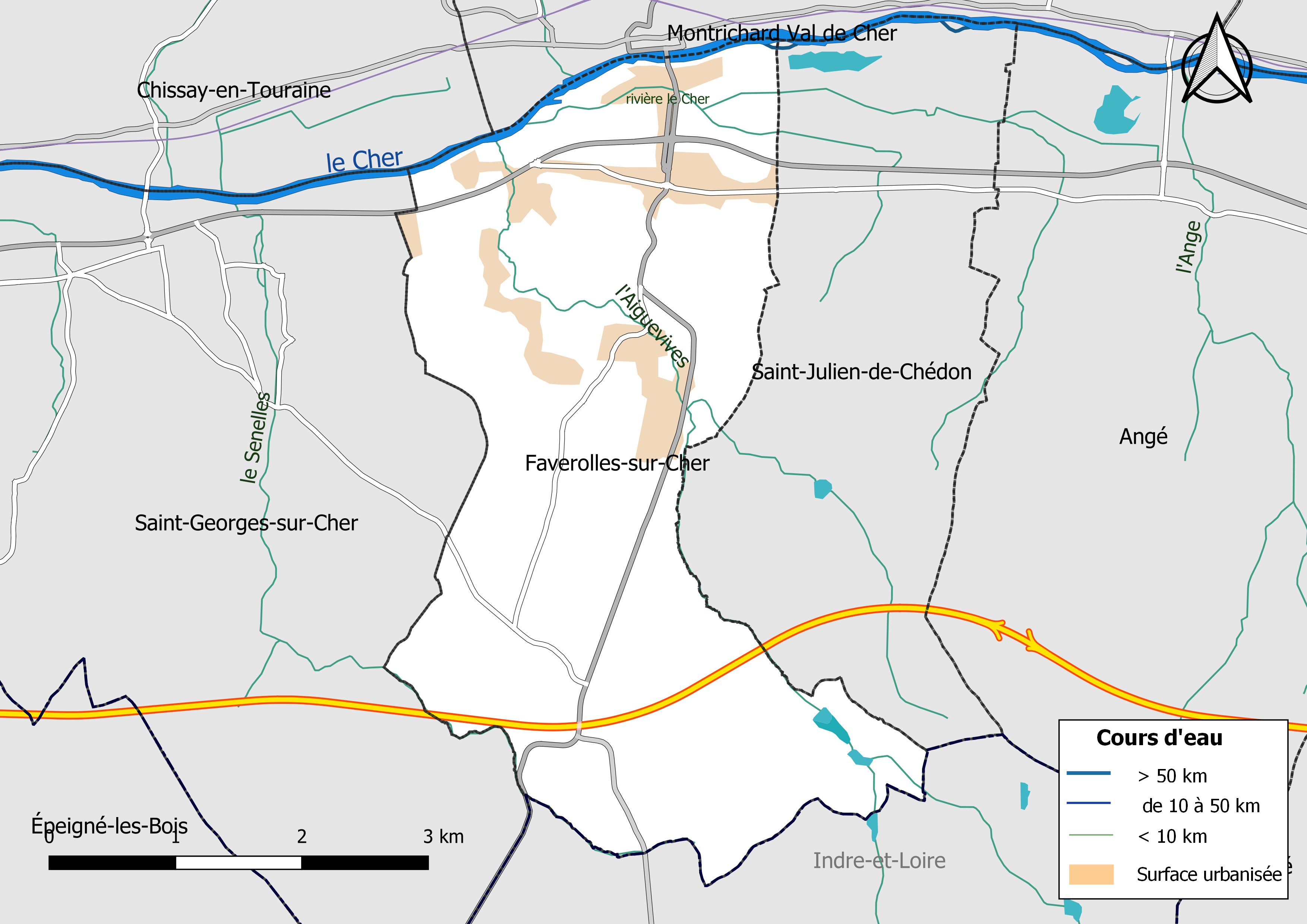 Carte du réseau hydrographique de la commune de Faverolles-sur-Cher (Loir-et-Cher, France).